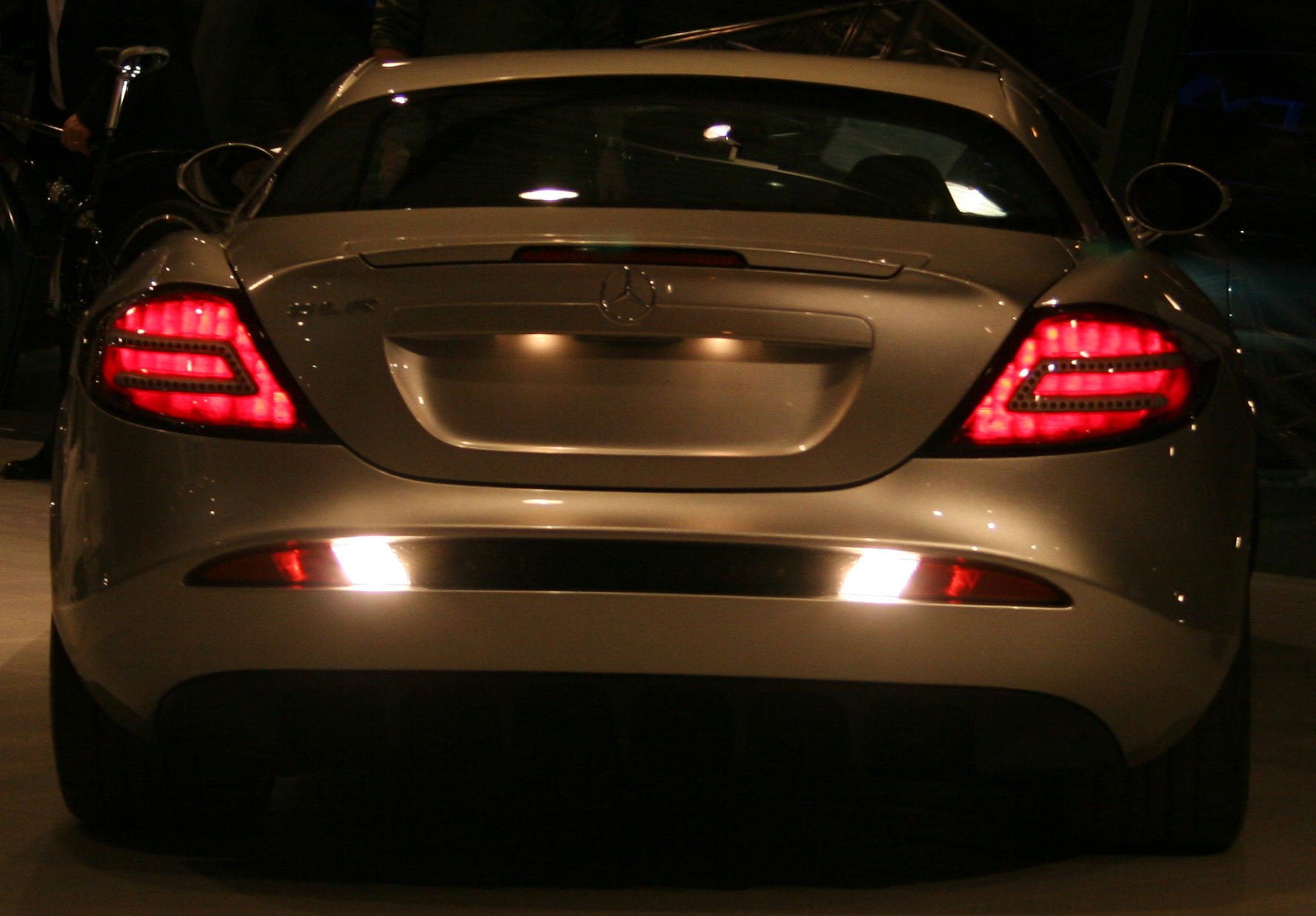 Mercedes-Benz SLR McLaren (Norway 2005)